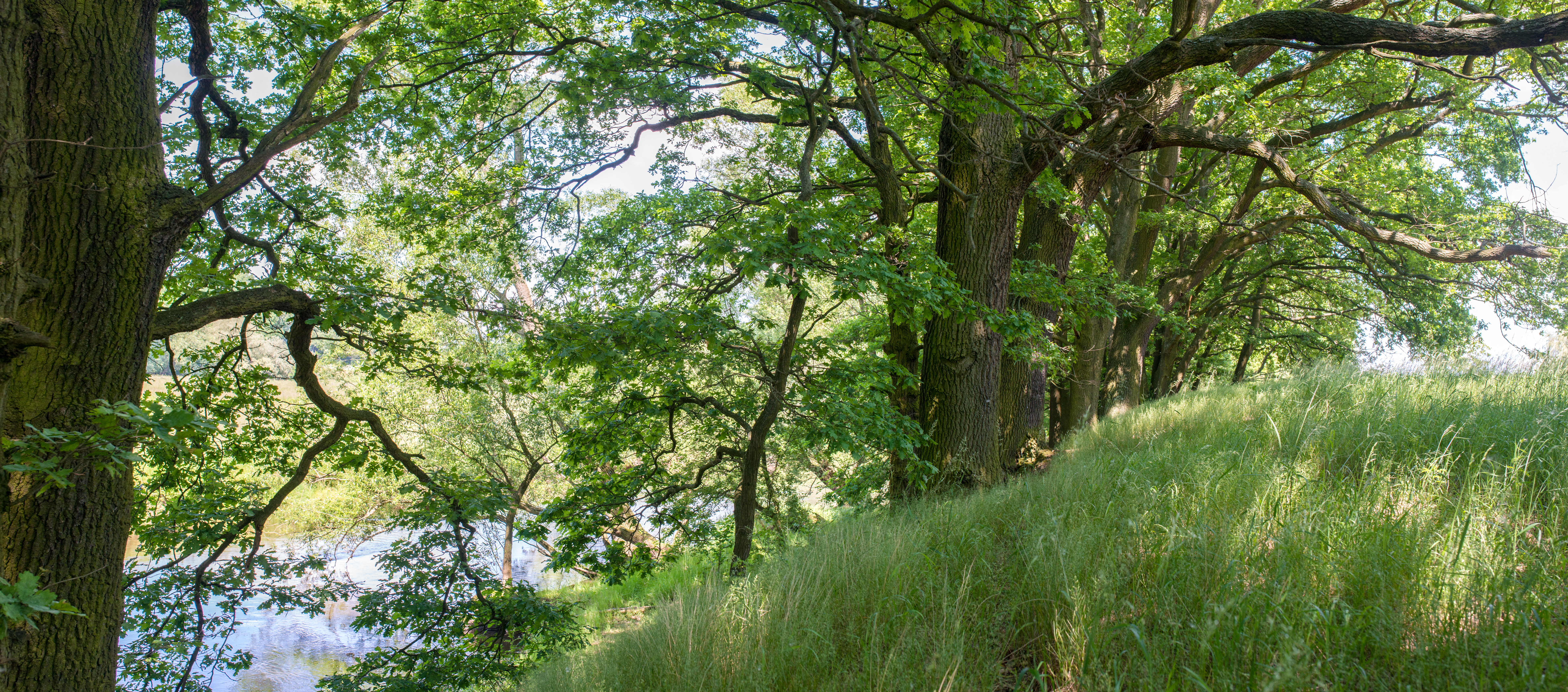 Nördliche Okeraue bei Veltenhof, Naturschutzgebiet BR 118